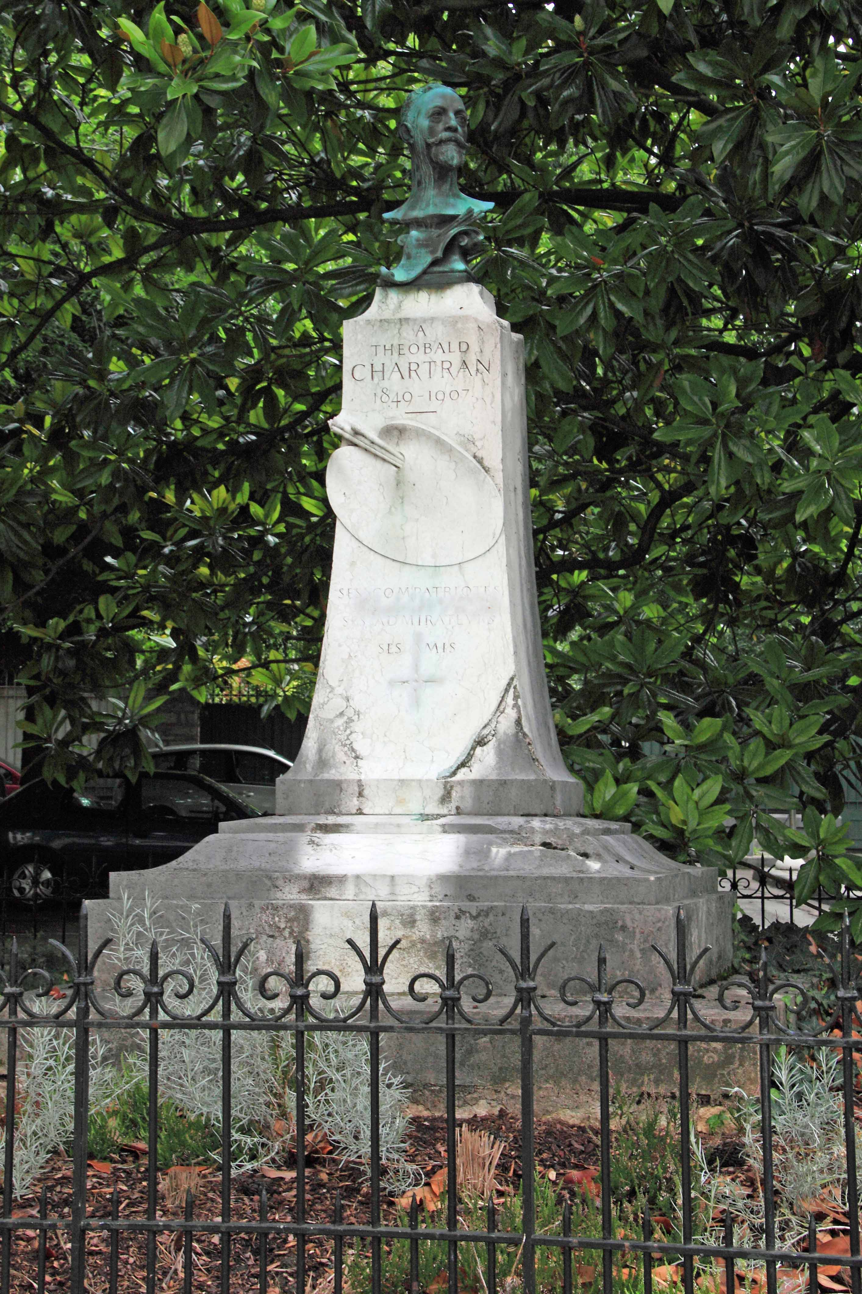 BESANÇON - Buste de Théobald Chartran - Place du Théâtre